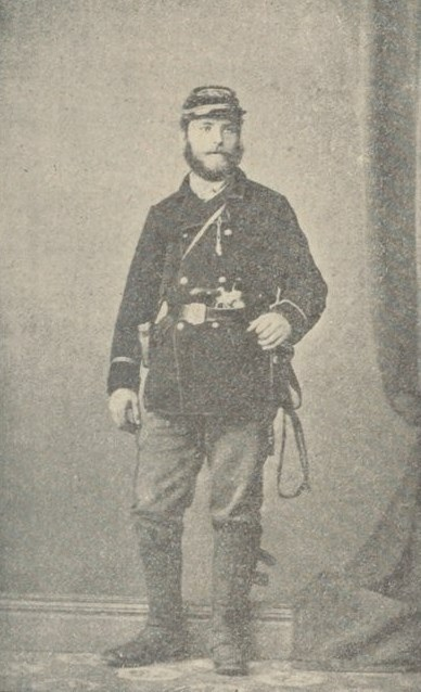 "Le lieutenant Gay".